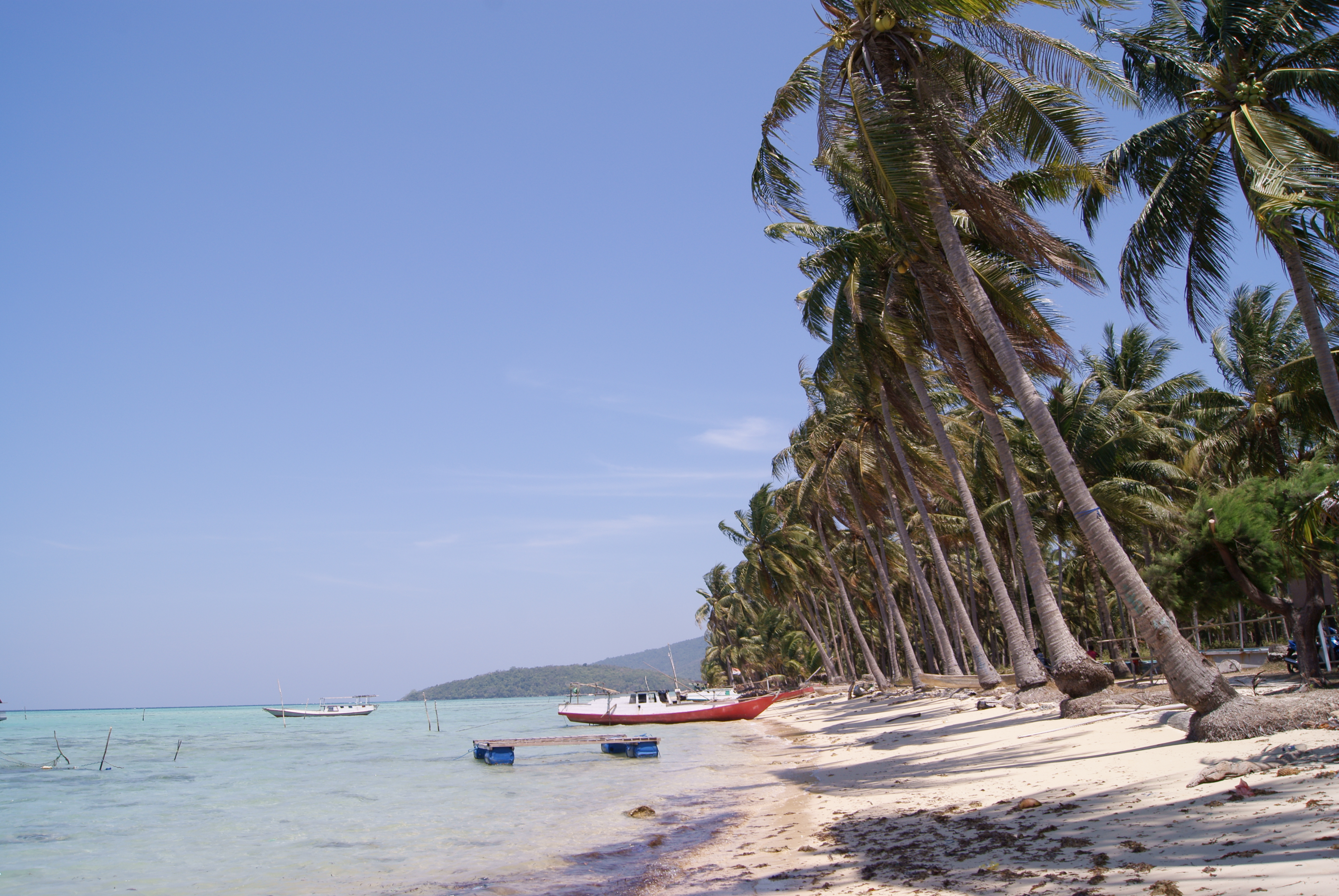 Pantai Barakuda, Karimun Jawa